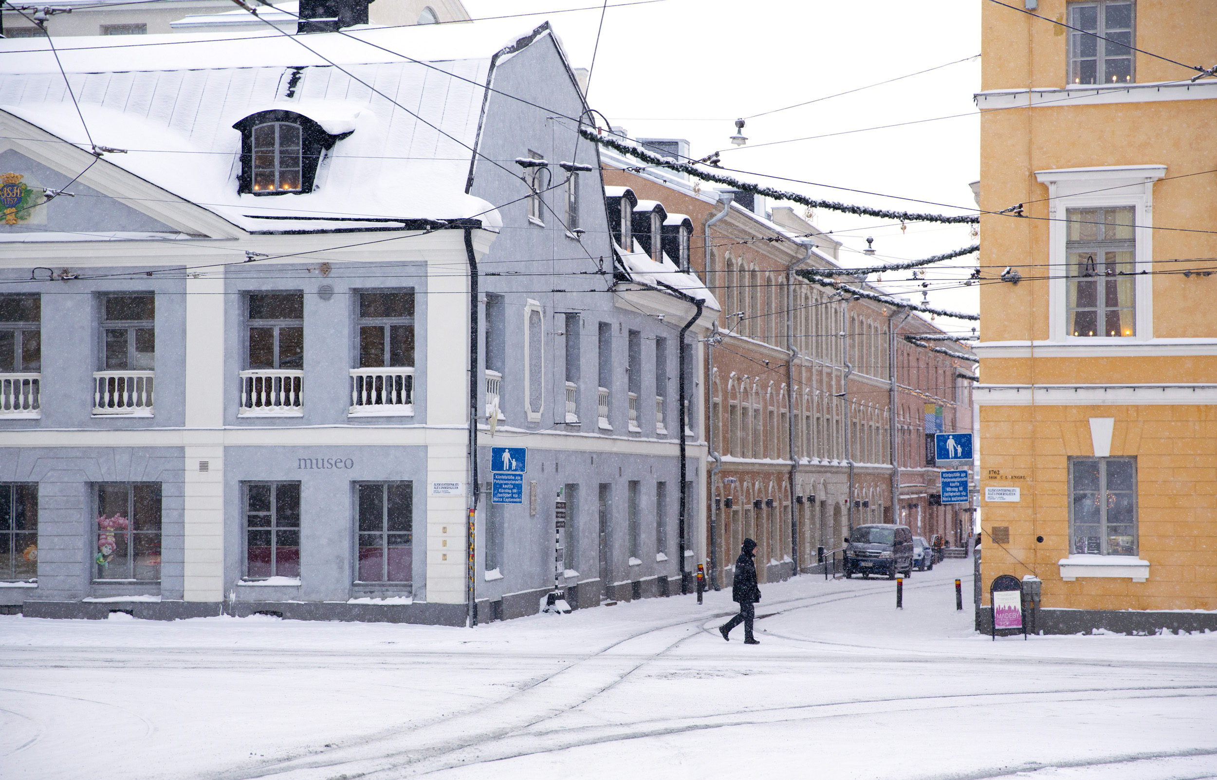 Helsingin kaupunginmuseo sijaitsee Aleksanterinkadun ja Katariinankadun kulmassa.